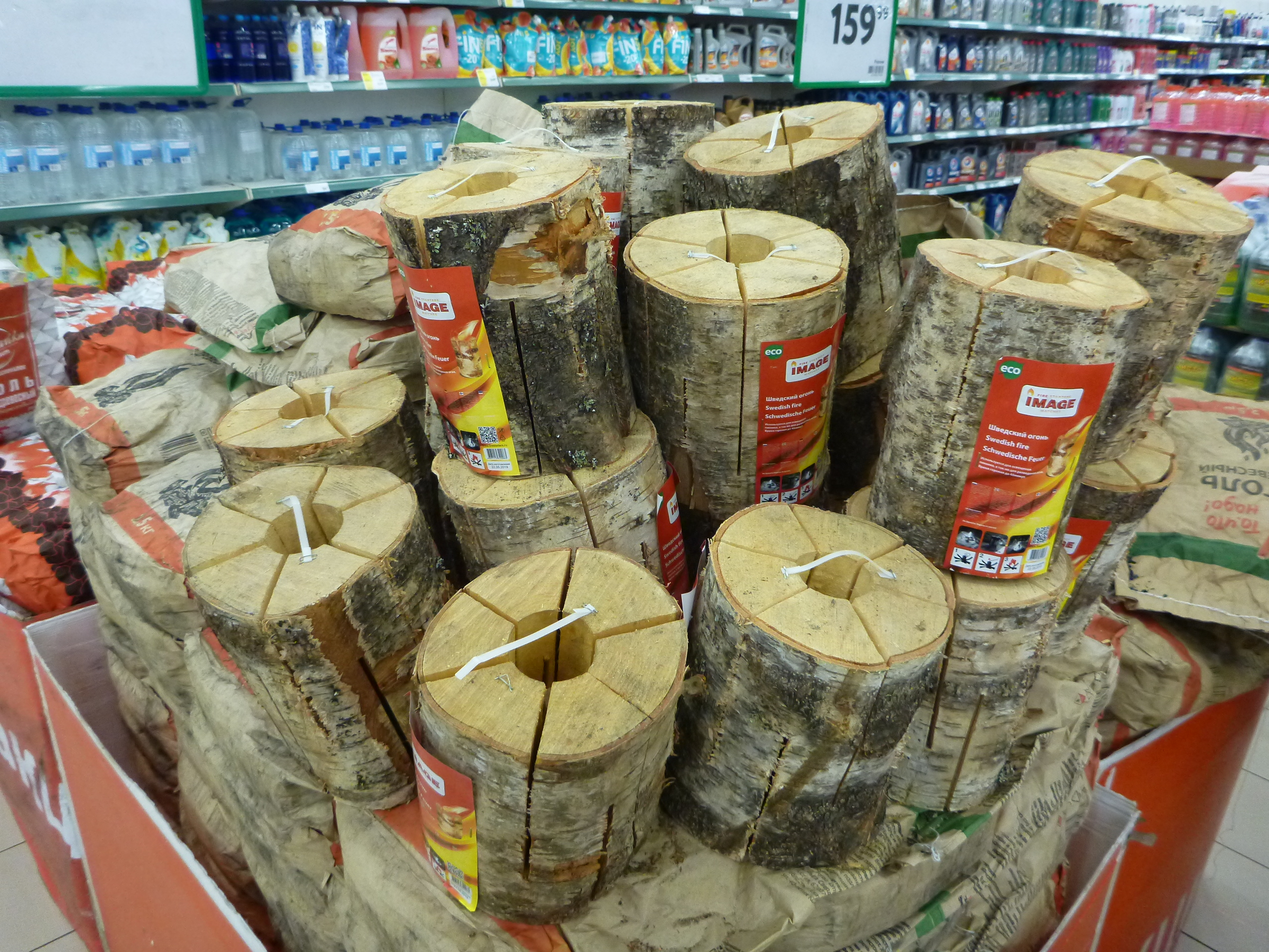 Поленья-полуфабрикаты в магазине Екатеринбурга февраль 2020 года